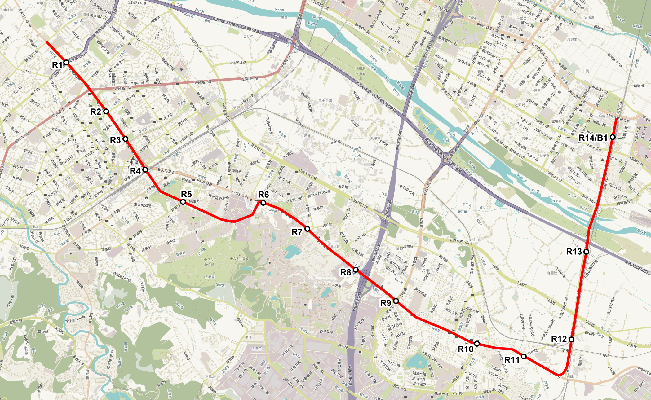 1997年臺灣省新竹都會區大眾捷運系統紅線路線圖